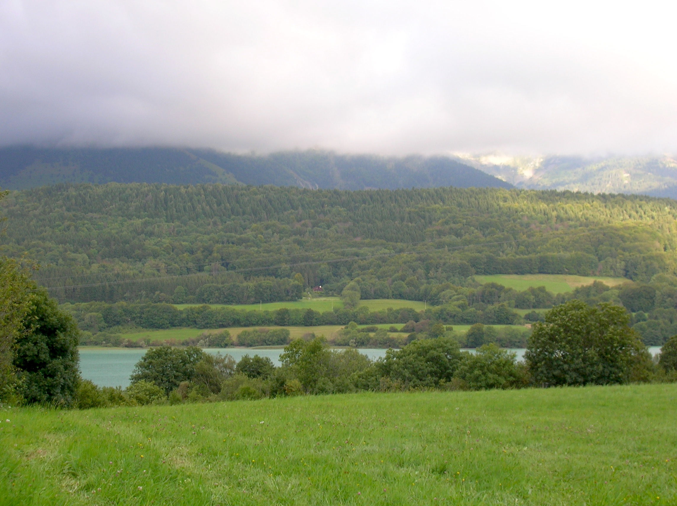 Lac de Pétichet depuis l'église de Saint-Théoffrey, Isère, France.